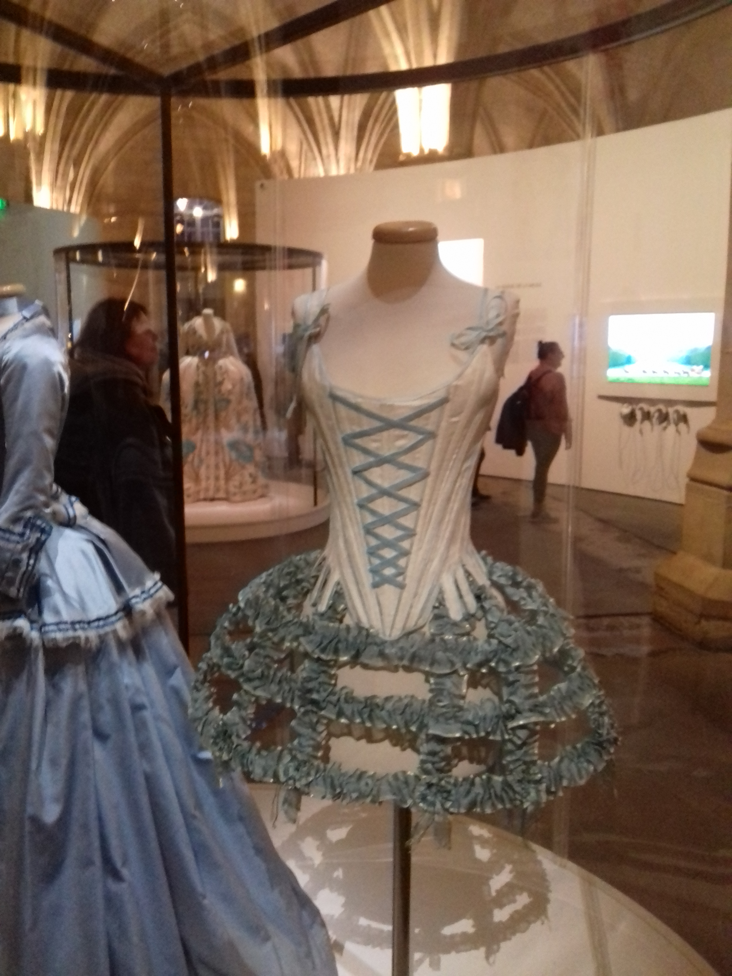 Milena Canonero, Lingerie intime. Buste en coton fantaisie avec application de rubans de velours bleu. Panier en organza de soie bleue monté sur structure en métal. Costume porté par Kirsten Dunst dans le film Marie-Antoinette (2006). Réalisation par le chef tailleur Gabriele Pacchia Mayer. Collection Alessandra Cinti, Sartoria The One, Rome. Exposition Marie-Antoinette, métamorphoses d’une image, à la Conciergerie.